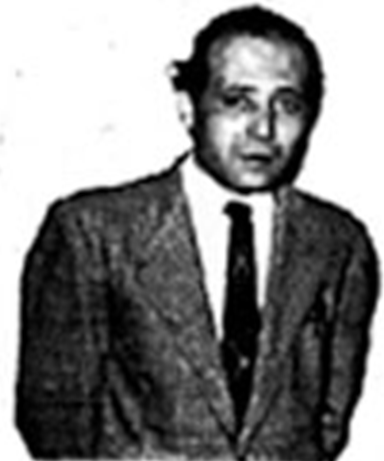 Mohamed Ferhat en exil à Alger au milieu des années 50.